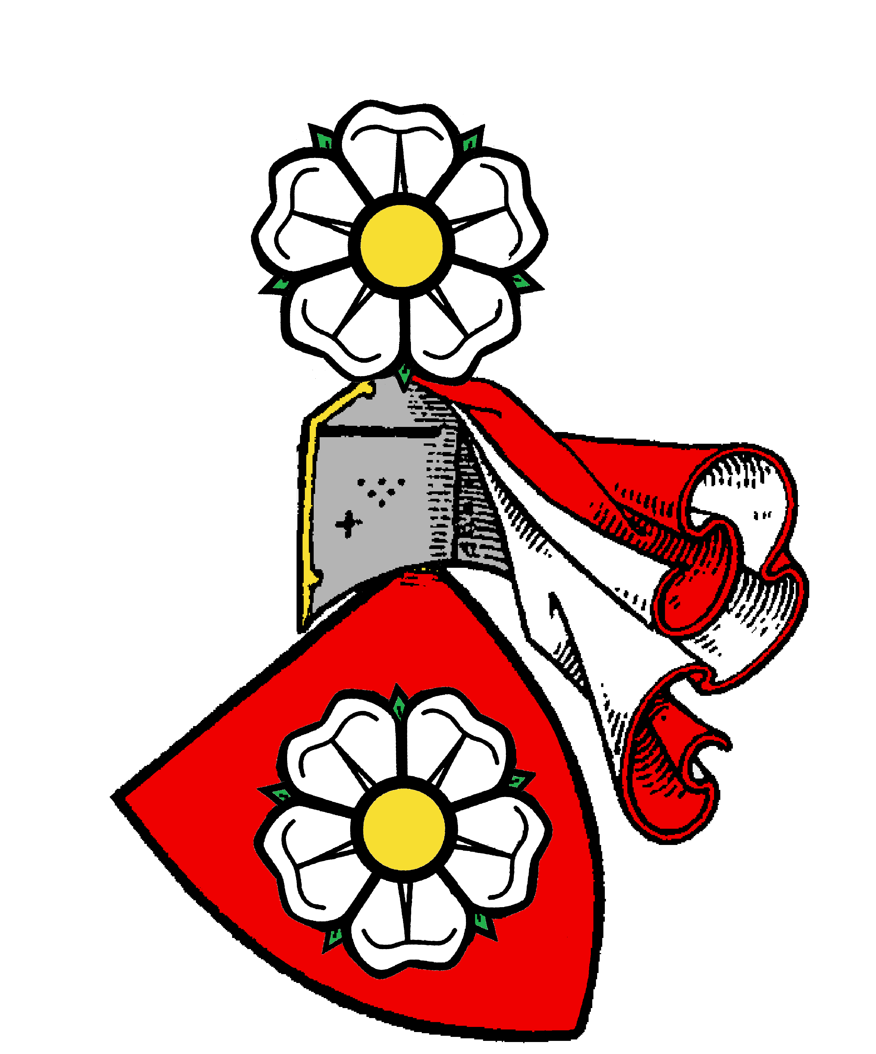 Původní znak pánů z Landštejna a Třeboně